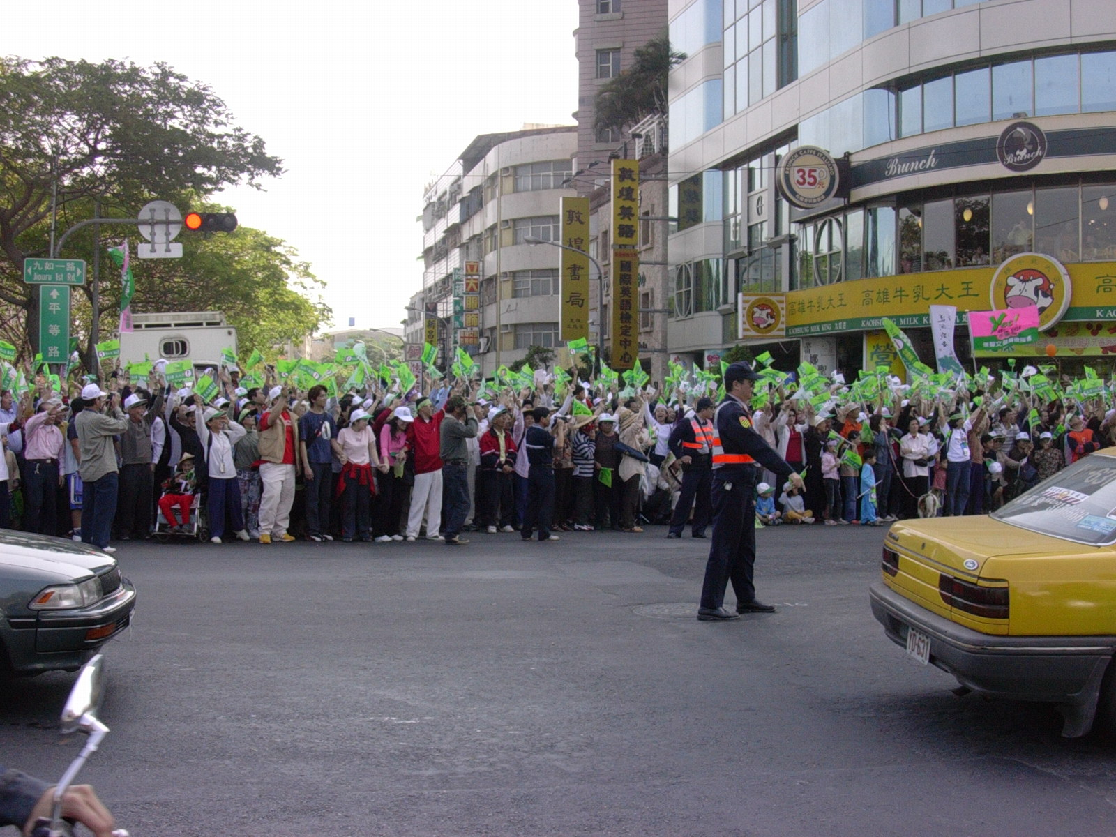 228百萬人手牽手護台灣，高雄市靠近科工館部分。